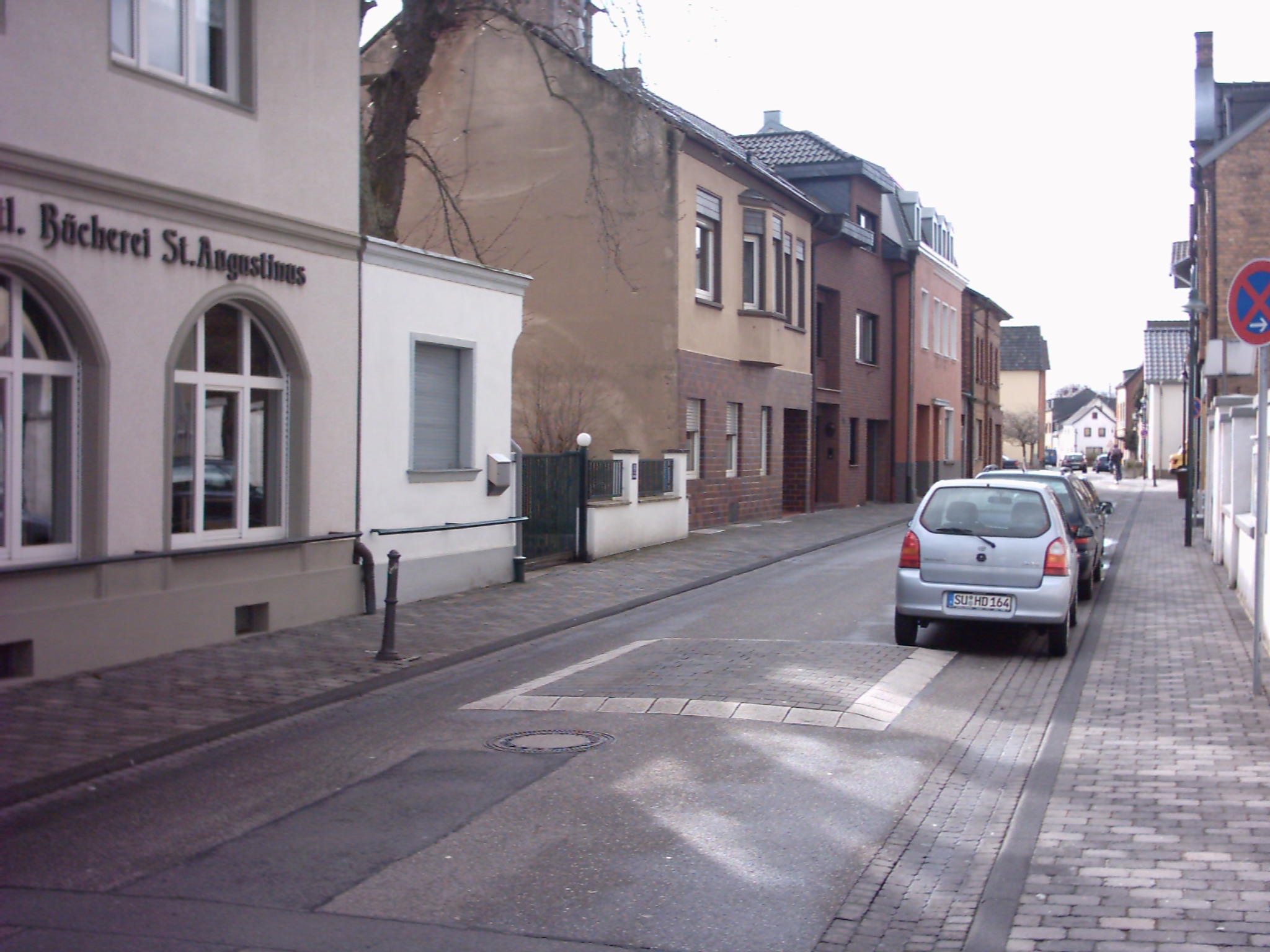 Altstadt von Menden, Sankt Augustin